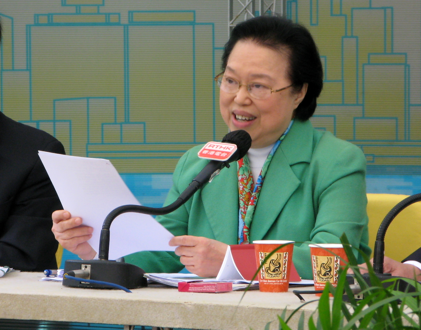 Maria Tam Wai Chu 譚惠珠